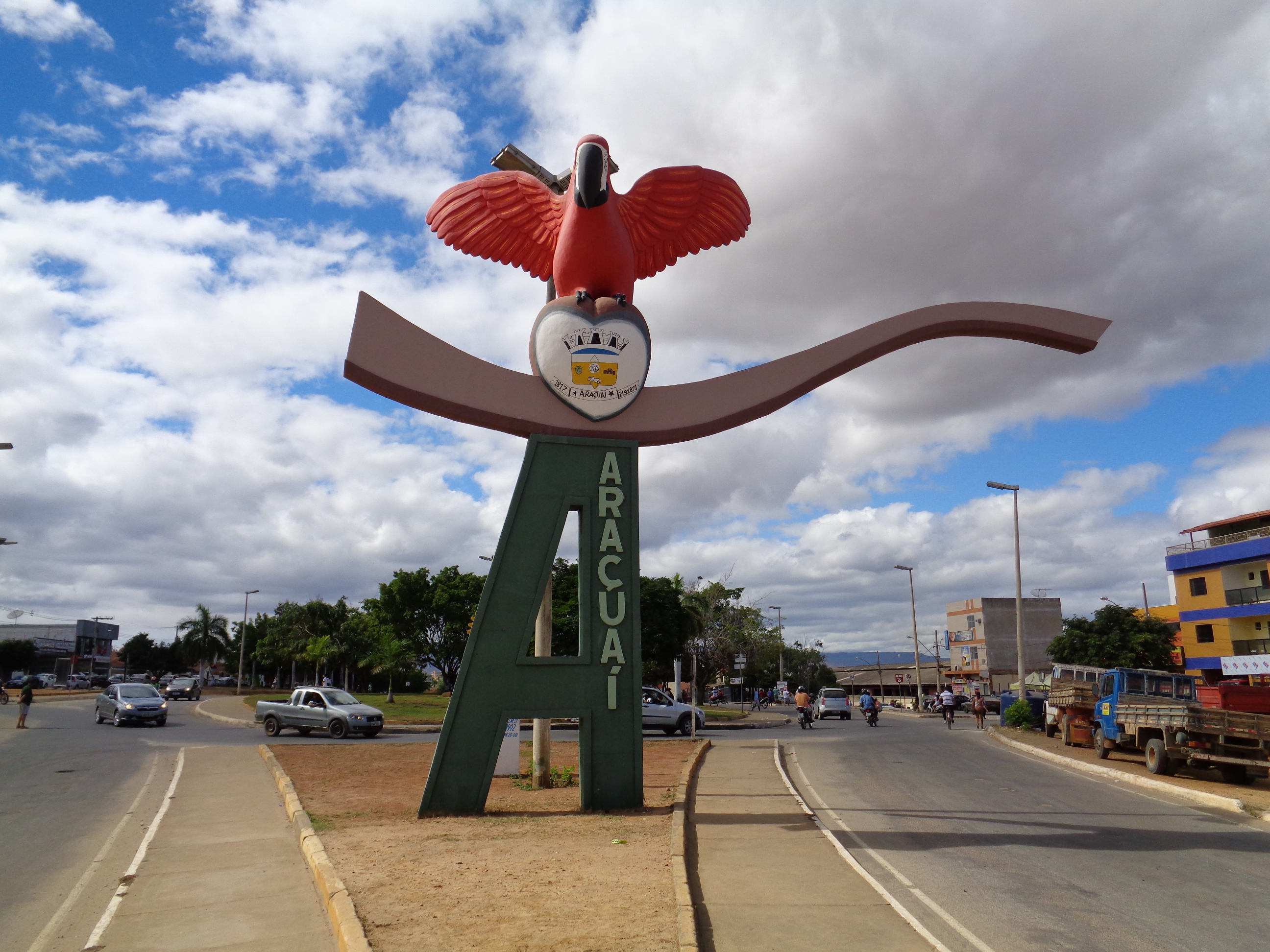 Monumento em Araçuaí, Minas Gerais, Brasil.